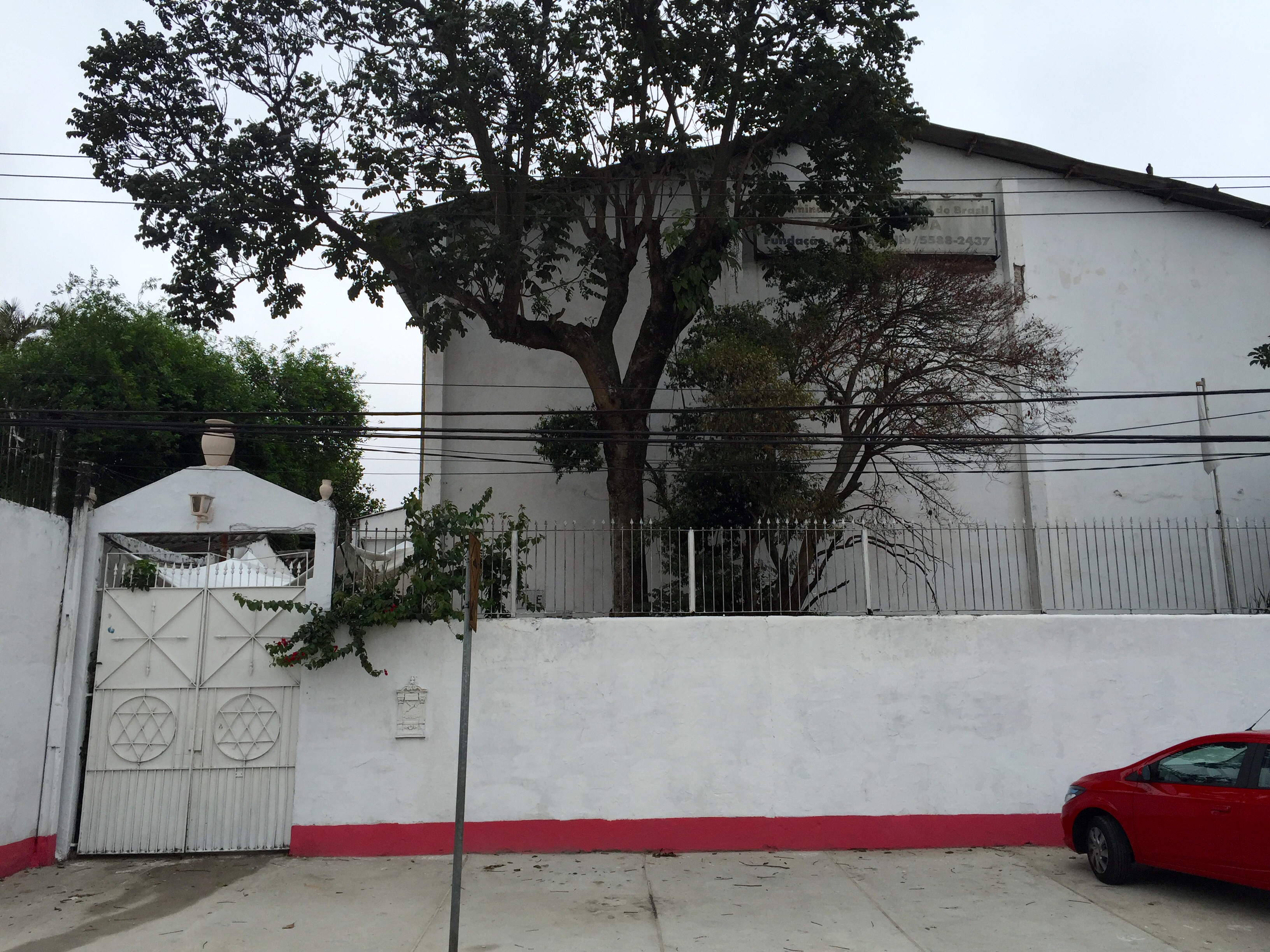 Fachada do Axé Ilê Obá, em São Paulo (SP), Brasil.